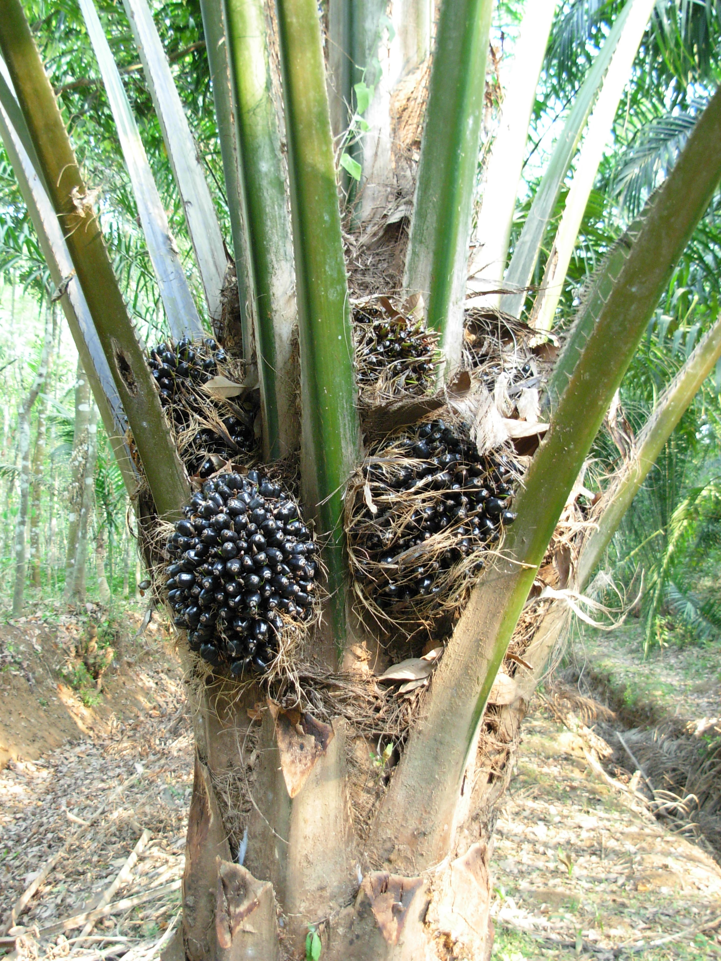 എണ്ണപ്പന.